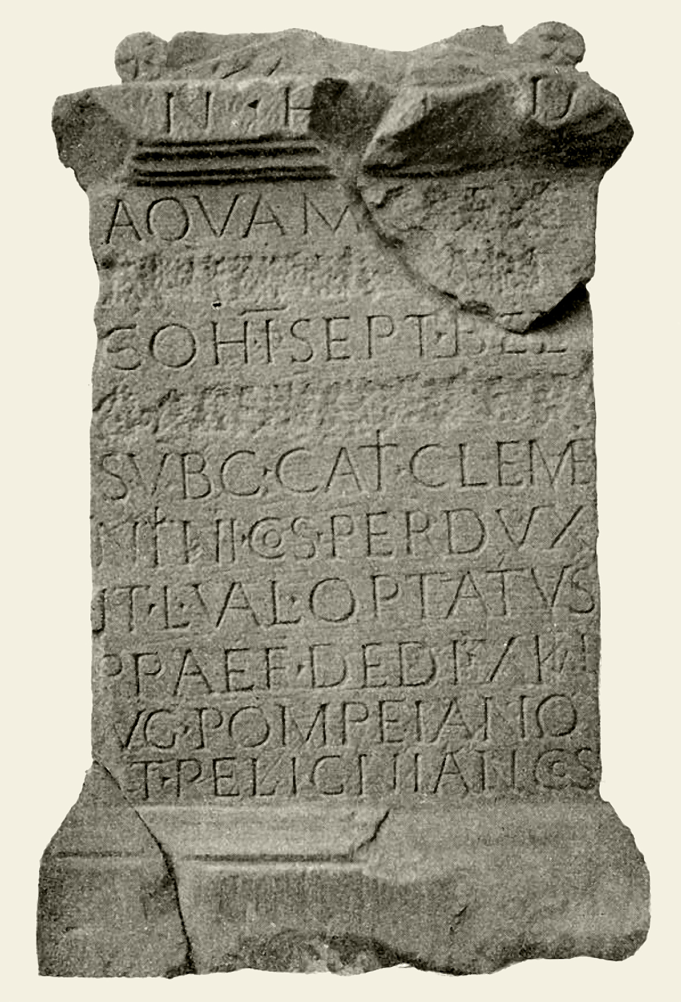 Öhringen, Westkastell. Altar, errichtet für den Bau einer Wasserleitung, geborgen 1911 aus dem Brunnen des Stabsgebäudes (CIL XIII, 11758; AE 1912, 00123): [I]n h(onorem) d(omus) d(ivinae) aquam Alex- andrianam coh(orti) I Sept(imiae) Bel- g(arum) Al xandrian(ae) sub c(ura) Cati Cleme- ntini co(n)s(ularis) perdux- it L(ucius) Val(erius) Optatus praef(ectus) dedi(cata) X Kal(endas) [A]ug(ustas) Pompeiano [e]t P(a)elignian(o) co(n)s(ulibus)